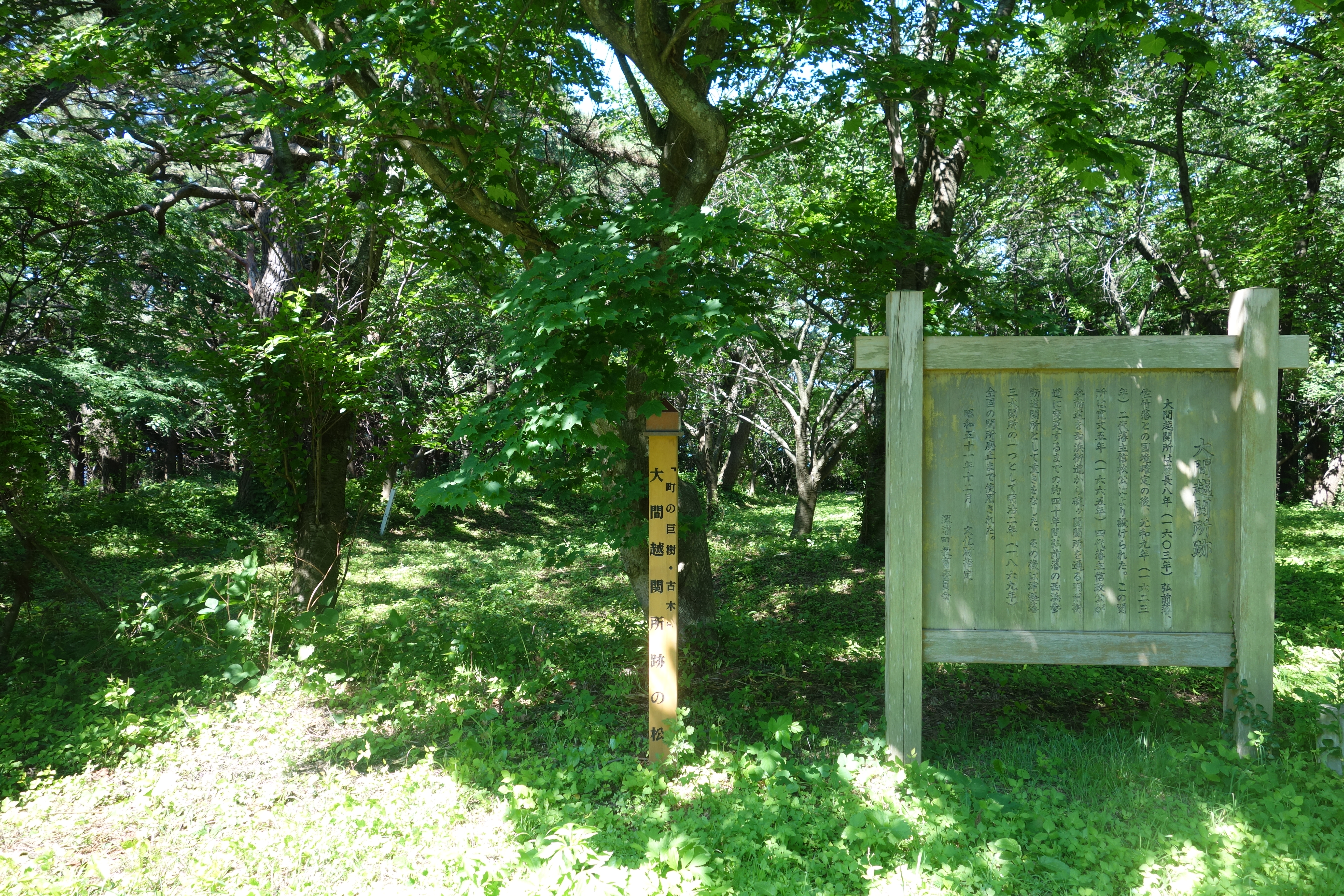 津軽藩の「津軽三関」の一つ、大間越関所（大間越番所）跡